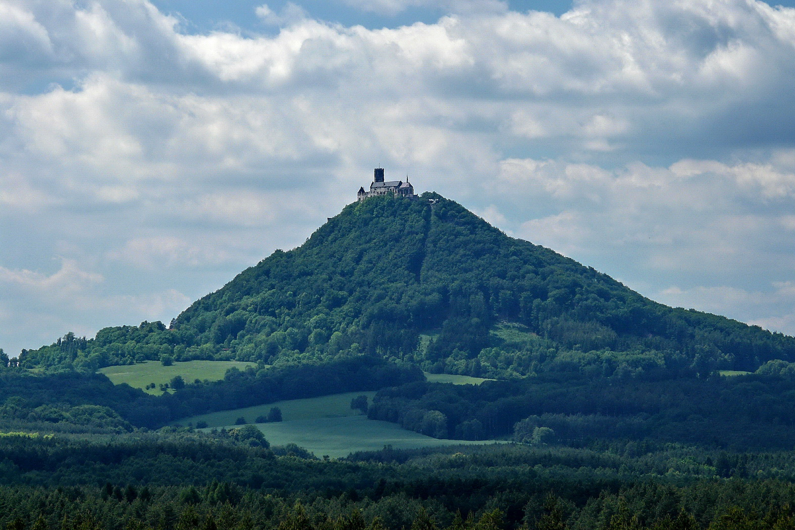 Velký Bezděz z Lysé hory